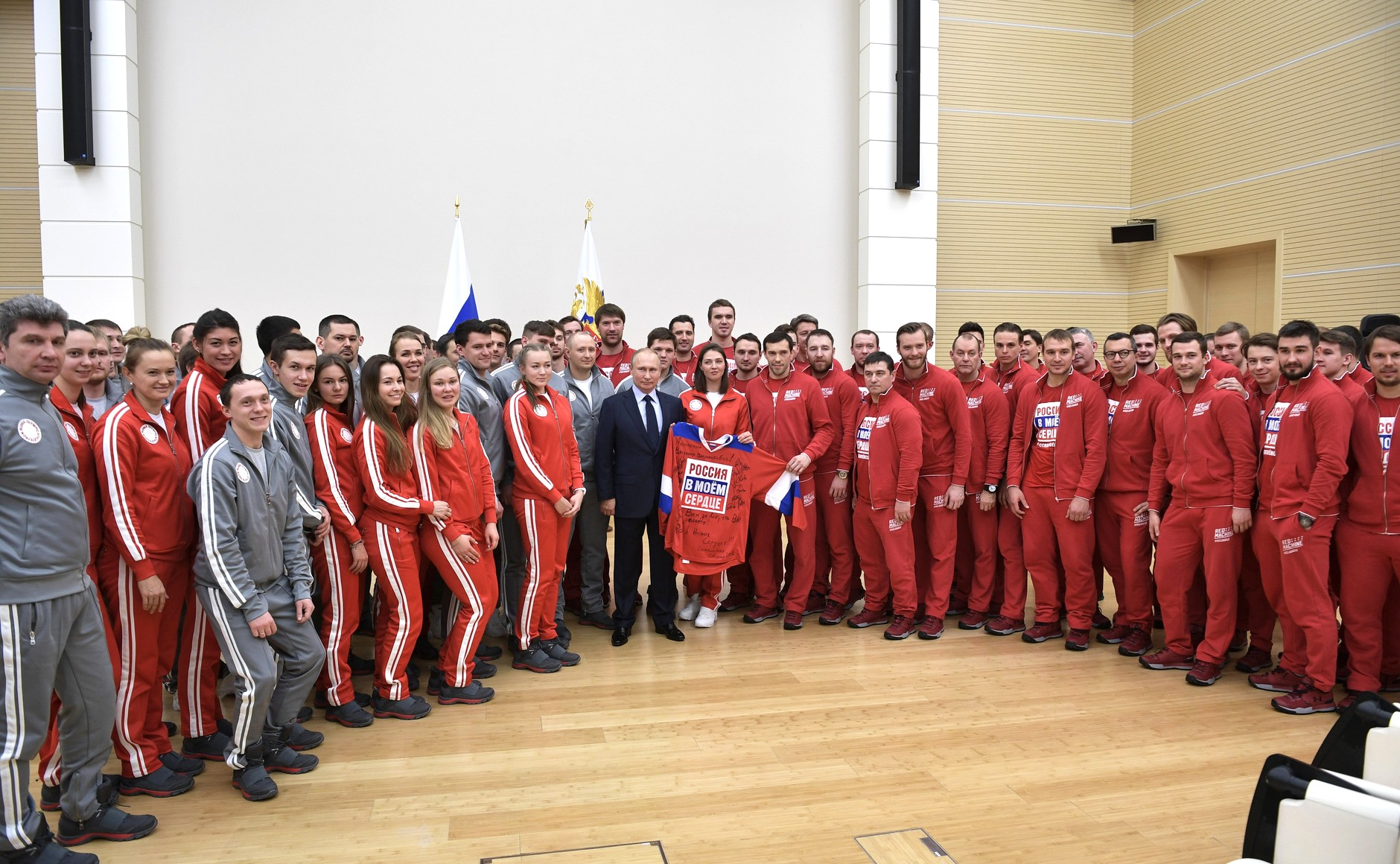 Встреча Президента России Владимира Путина с российскими спортсменами – участниками XXIII Олимпийских зимних игр 2018 года в Пхёнчхане.